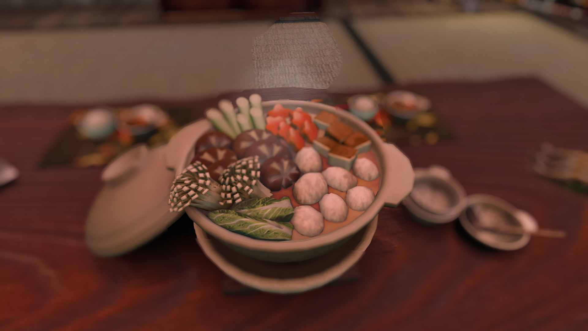 Esta imagen representa un ejemplo de como se puede emplear el producto derivado del Surimi llamado Tsumire en la gastronomia asiática, en este caso, combinado con distintos ingredientes vegetales y setas en un caldo.